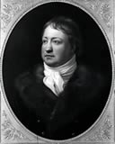 Franz Erwein von Schönborn (1776-1840), Bayerischer Generalmajor, Reichsrat und Standesherr